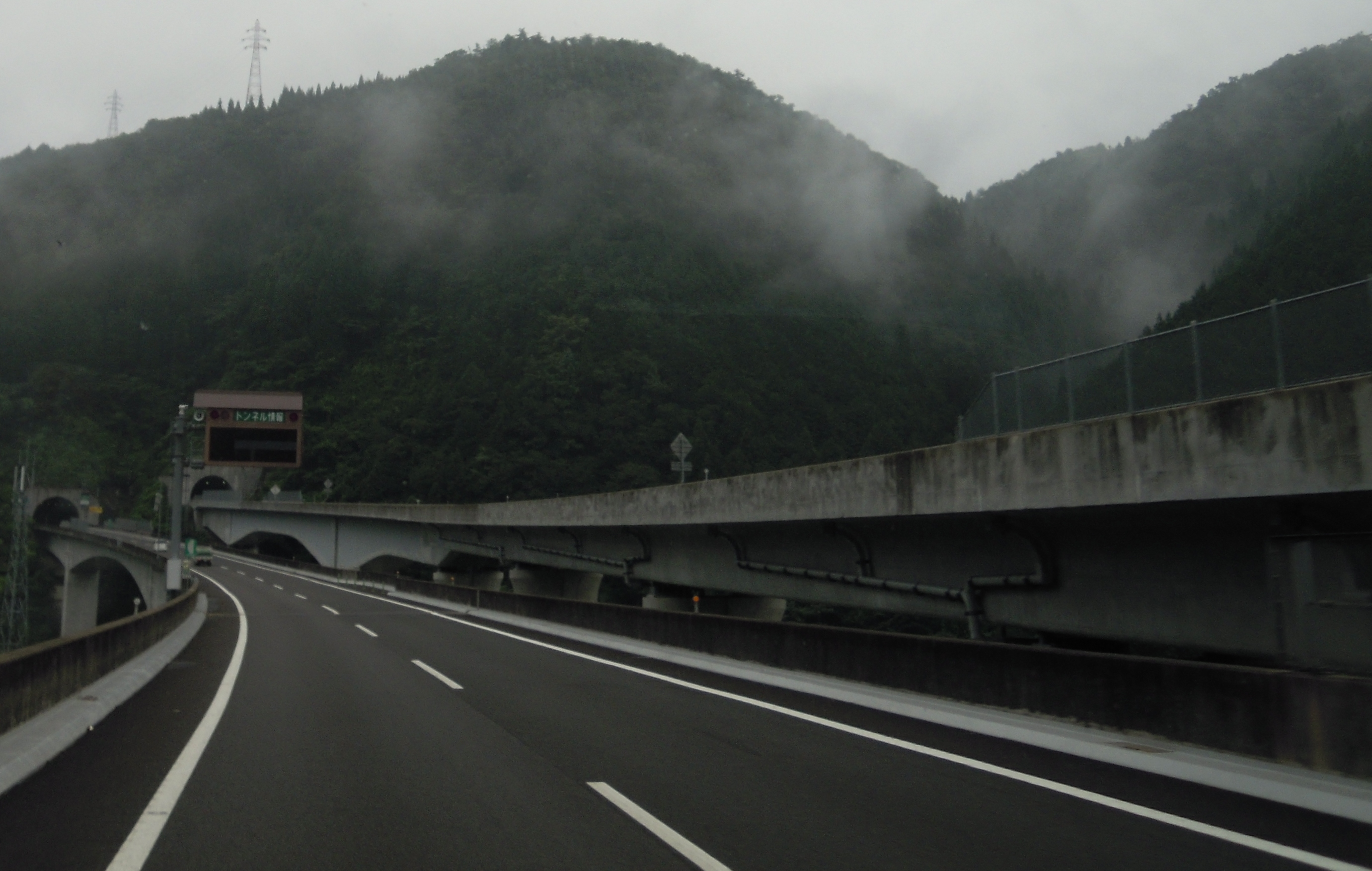 東海北陸自動車道の小瀬子トンネル付近で撮影。